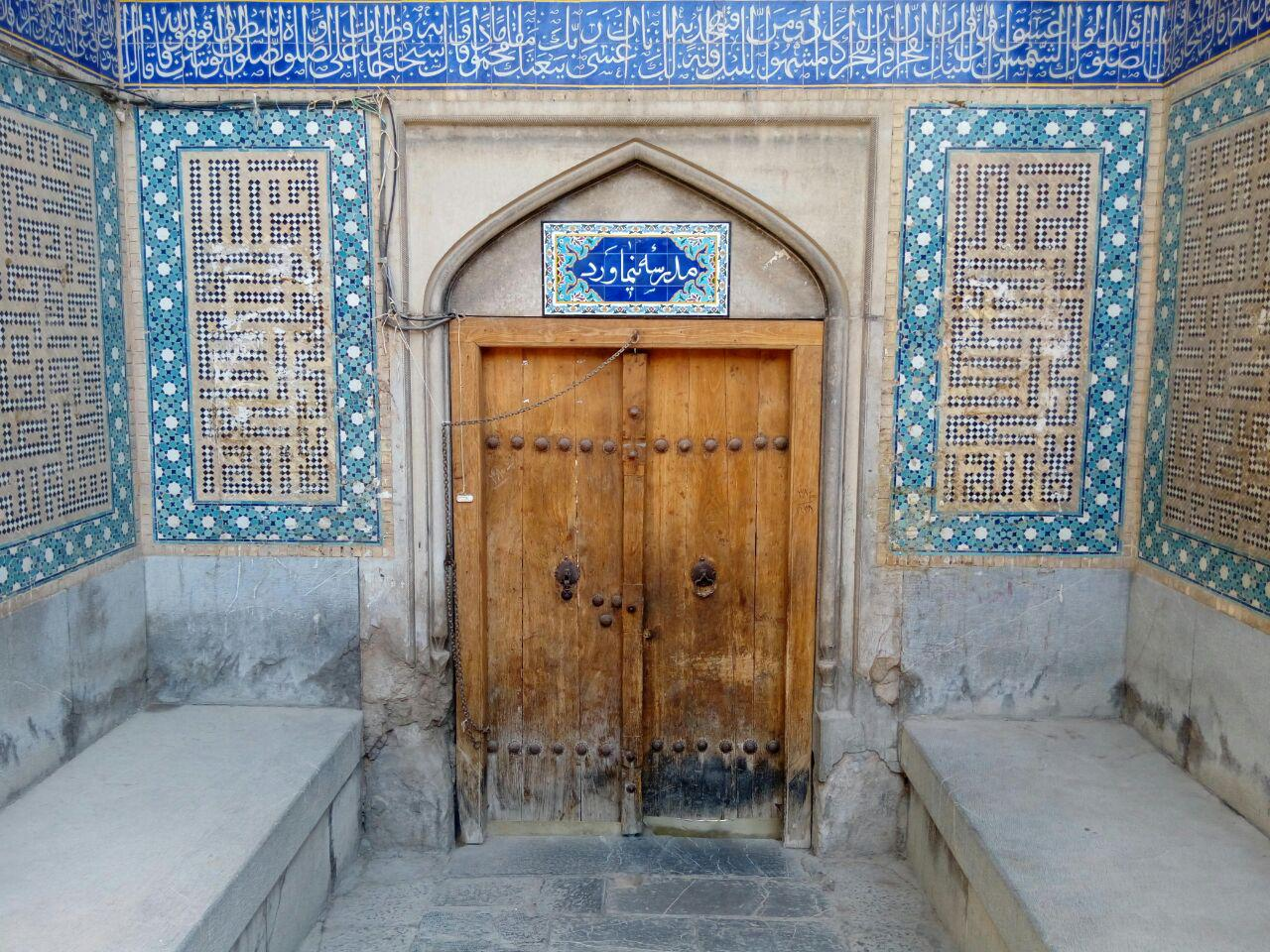 مدرسه نیماورد